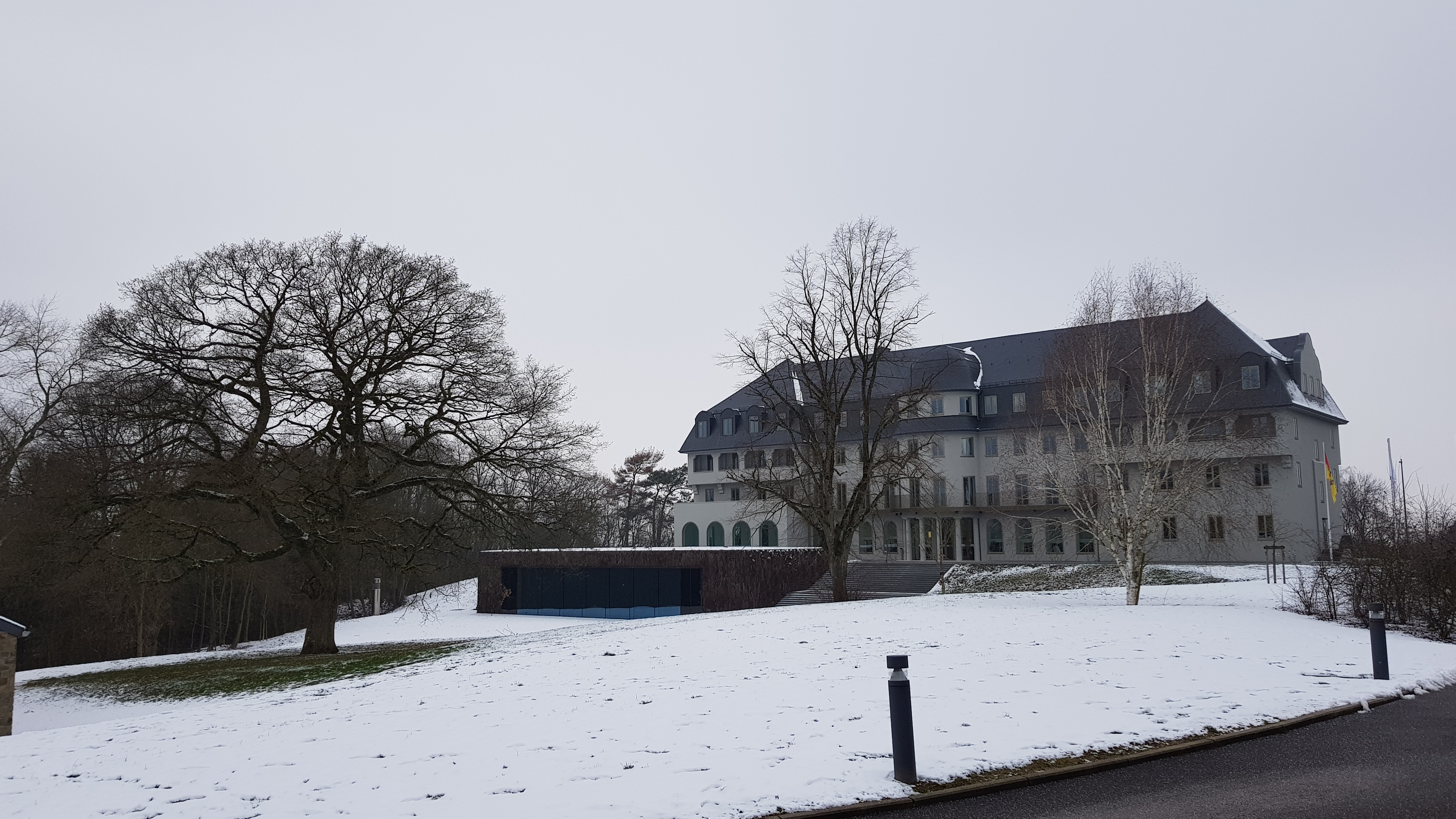 Parlamentsgebäude der Deutschsprachigen Gemeinschaft, Eupen, Belgien